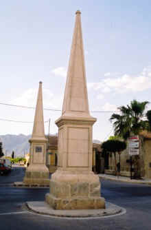 Mojones del Reino, mojones que separaban los reinos de Murcia y Valencia y que todavía marca el límite.